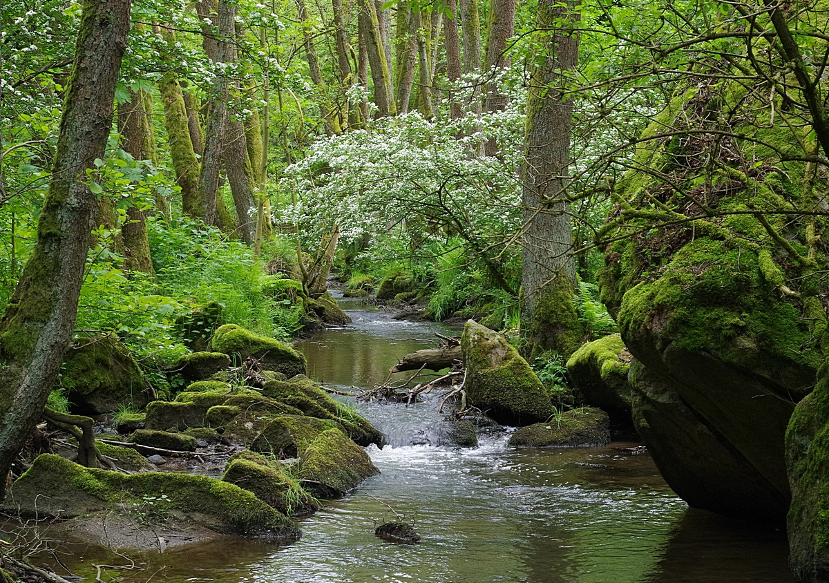 Leraubach im Naturschutzgebiet „Lerautal bei Leuchtenberg“ in 92705 Leuchtenberg, Oberpfalz